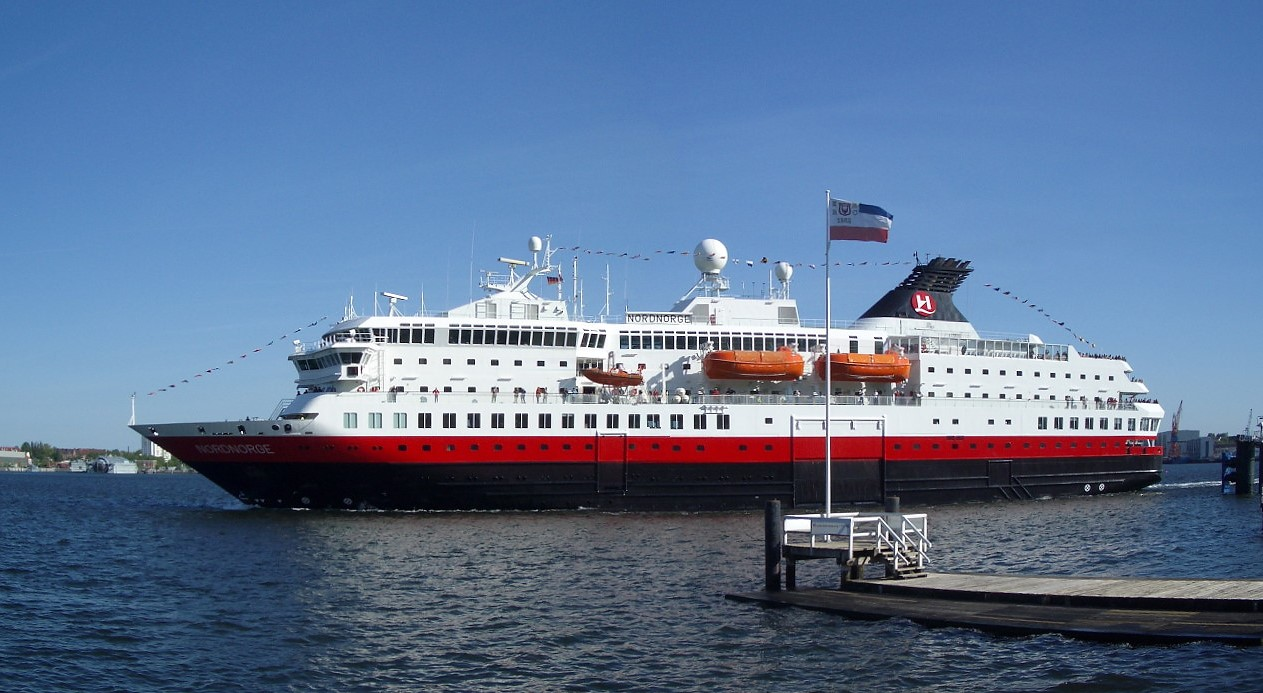 Kreuzfahrtschiff/Fähre Nordnorge im Kieler Hafen. Das Schiff fährt normalerweise auf der Hurtigruten.